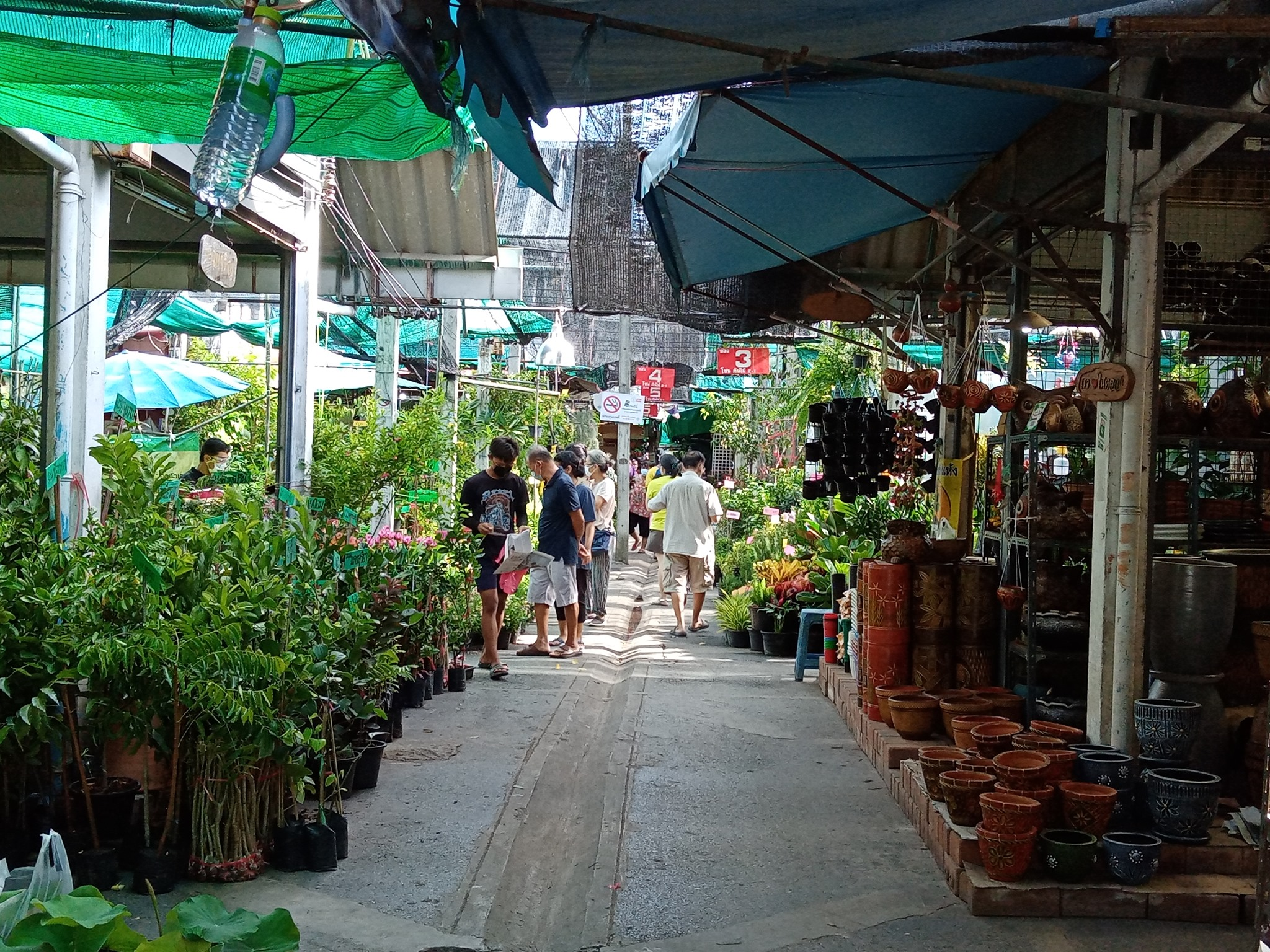 ส่วนของไม้ดอก ไม้ประดับ สนามหลวง 2